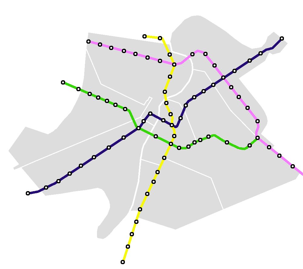 نقشه آینده مترو اهواز، خطوط طراحی و ارائه شده